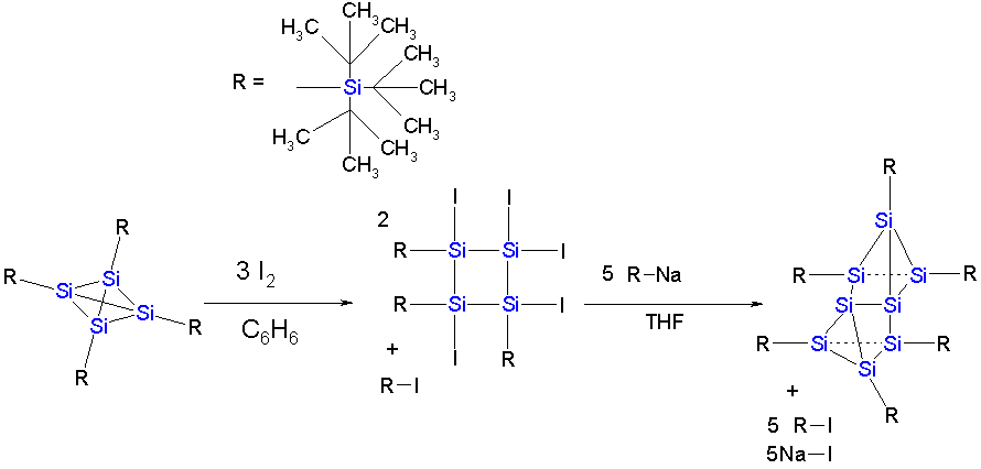 SilatetrahedraneDimer